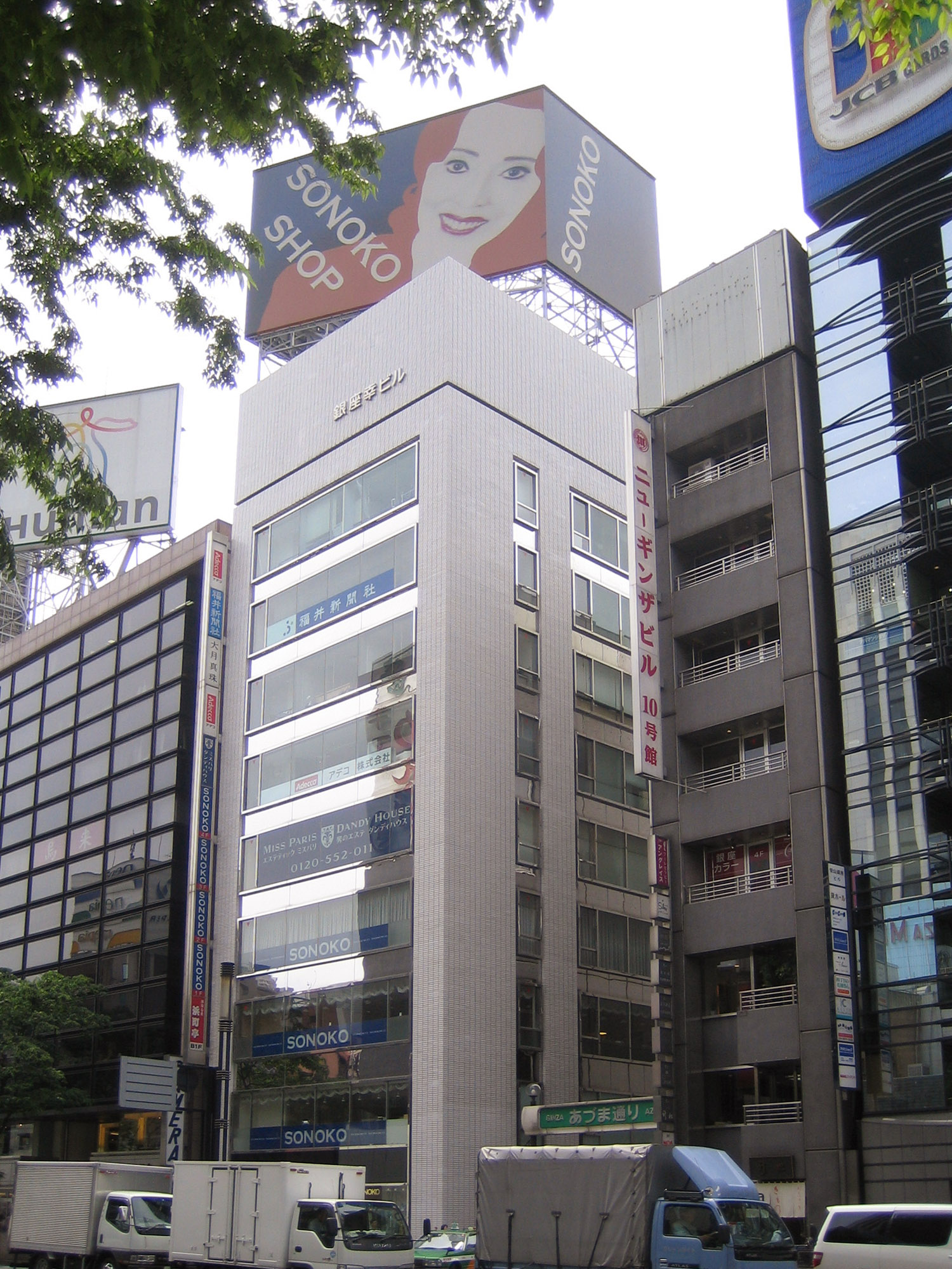 SONOKO Ginza (SONOKO銀座店), in Chuo, Tokyo, Japan